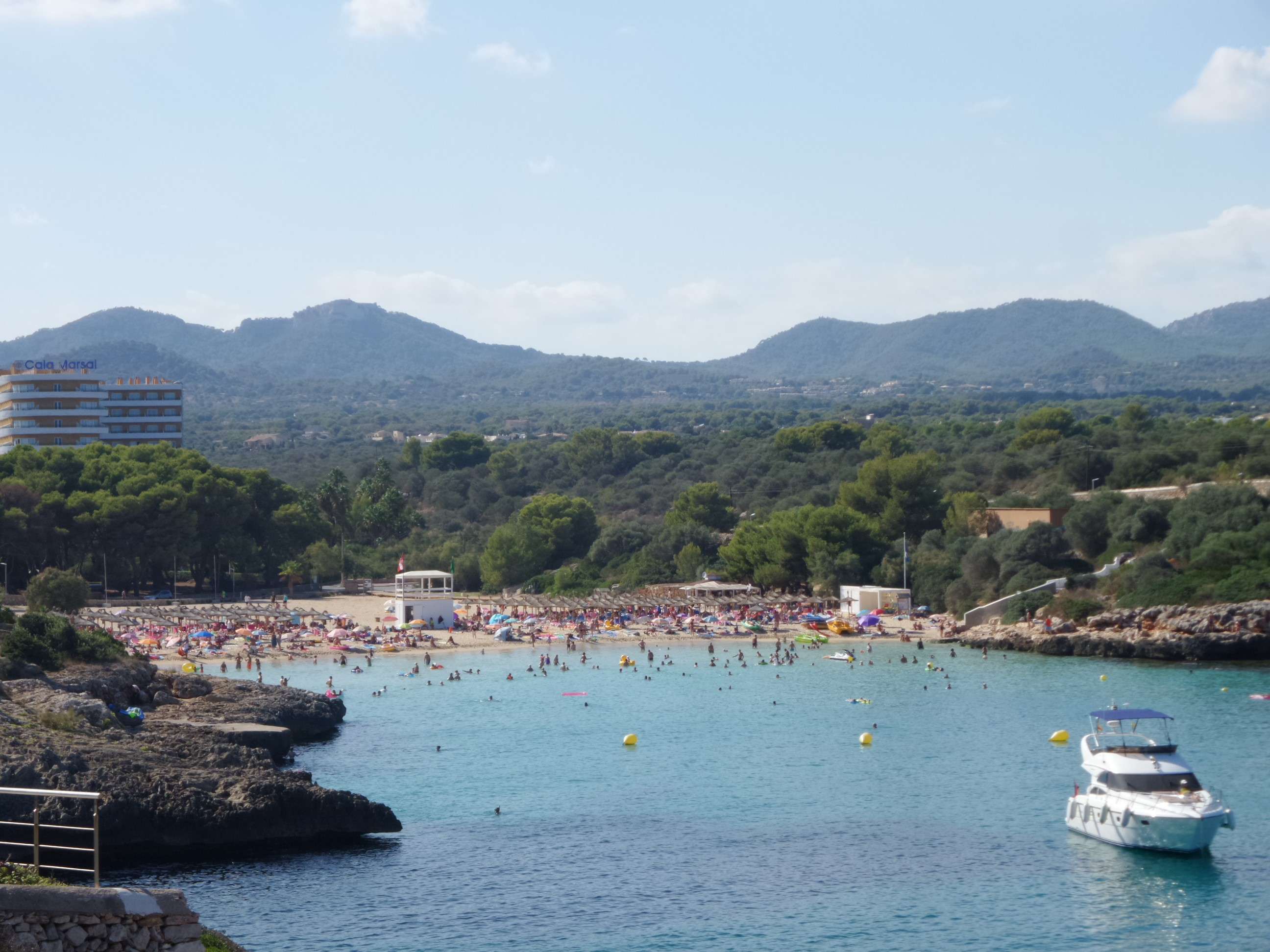 Cala Marçal (Bucht) bei Portocolom